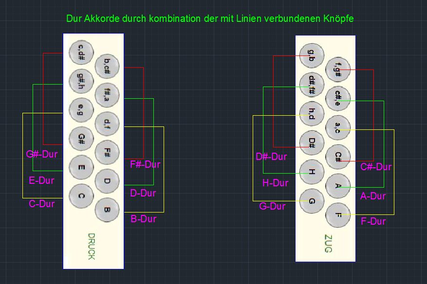 Basstastenbelegung einer Schrammelharmonika - Durkombinationen